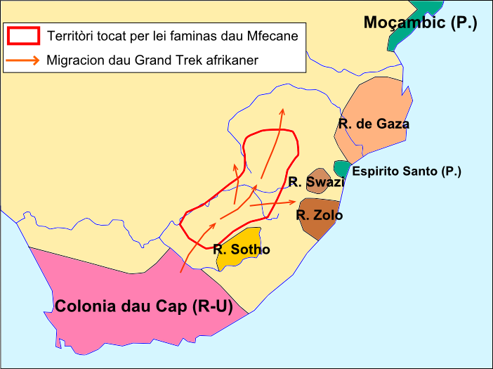 Sud d'Africa vèrs 1820-1840 durant lo Mfecane e la migracion deis Afrikaners.